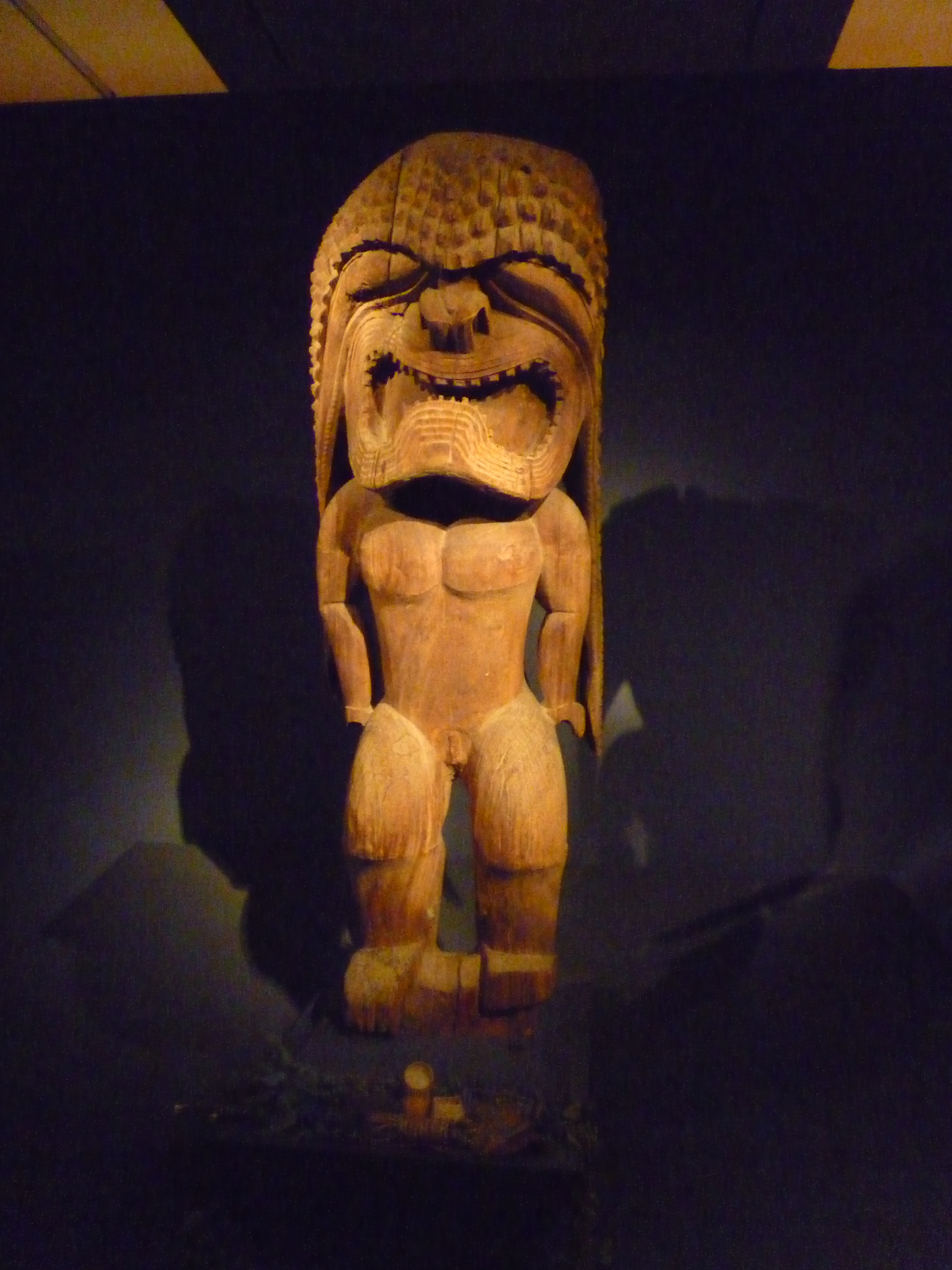 Kuka'ilimoku. Breadfruit wood (Artocarpus incisus). Hawai'i.